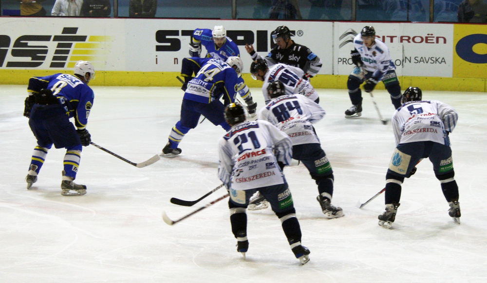 Hokej